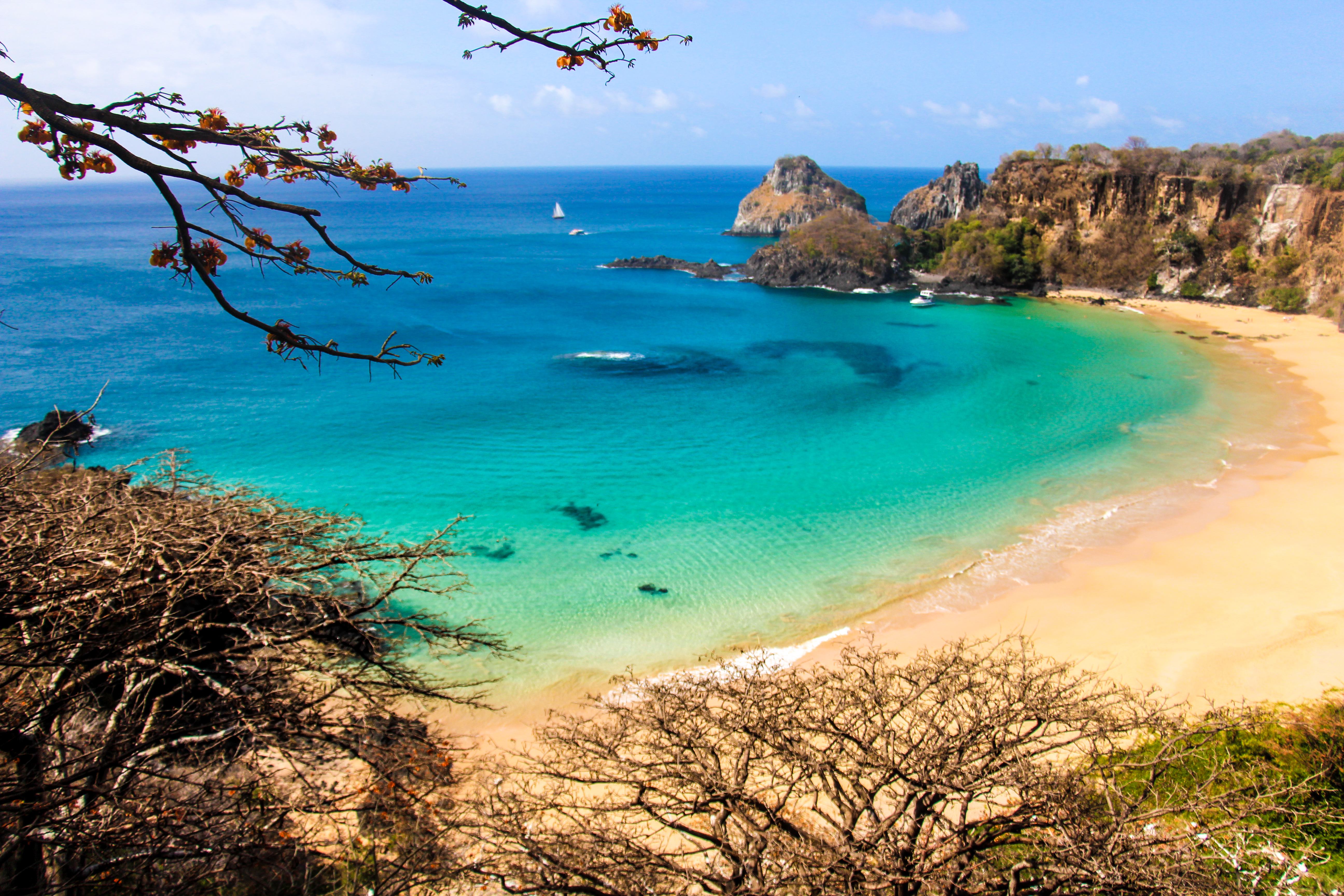 Fernando de Noronha